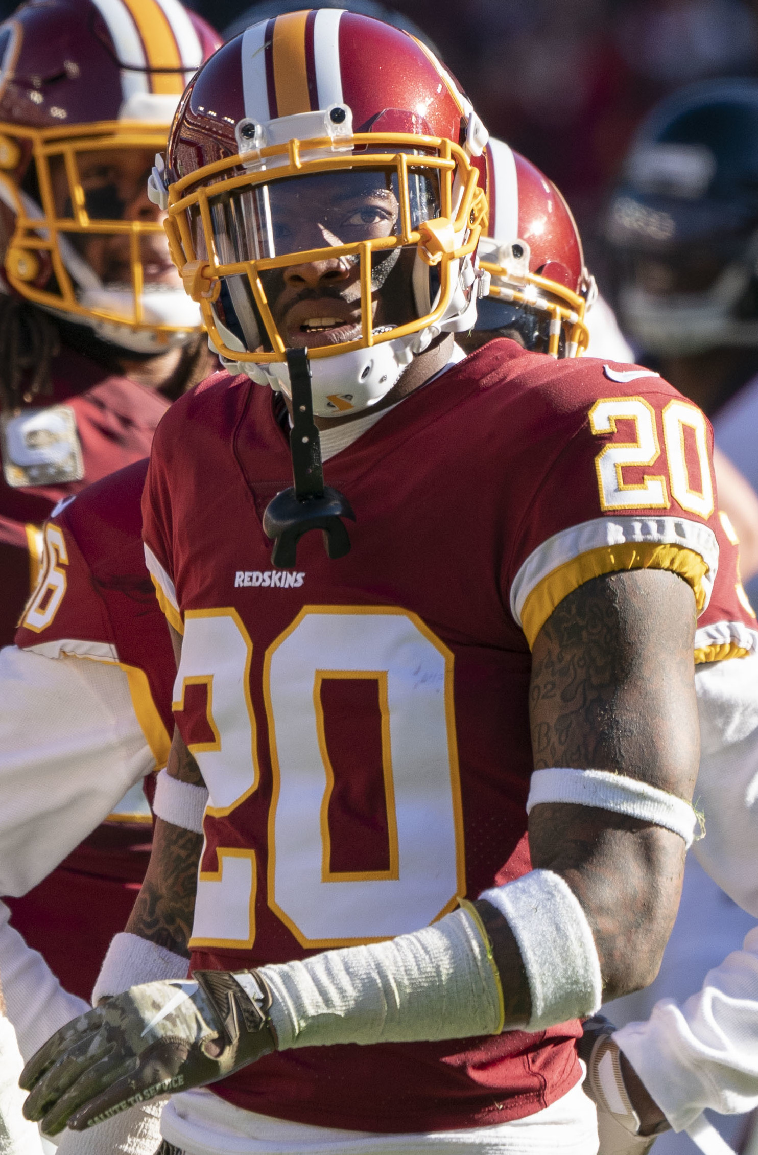 Falcons at Redskins 11/04/18